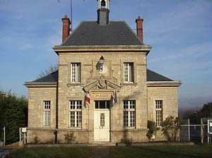 Marie de Courcelles Sapicourt